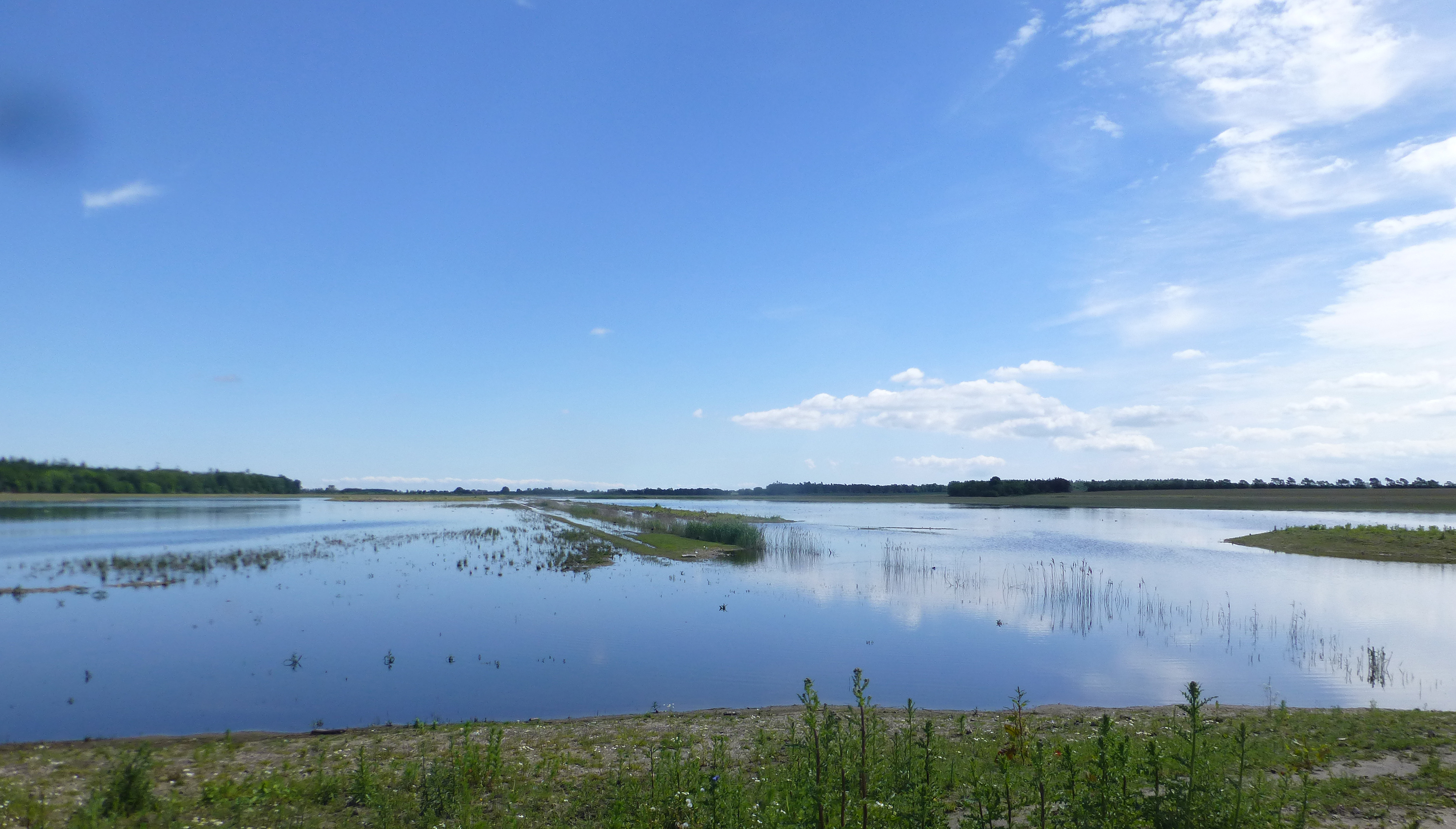 Gyldensteen Engsø ved Gyldensteen Strand